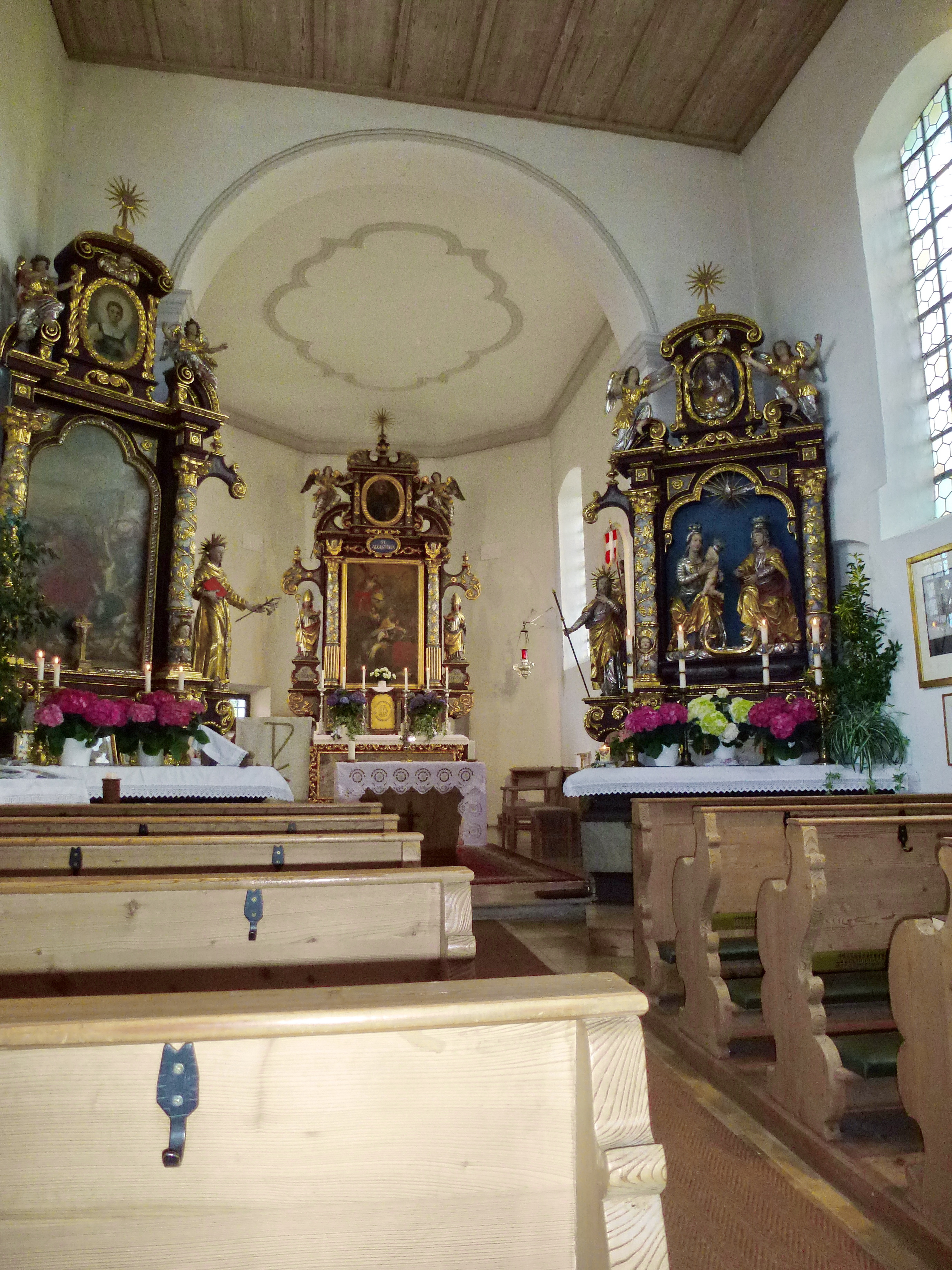 Bergkirchen - OT Feldgeding: Kirche St.Augustin. Innenaufnahme zum Altar hin nach O